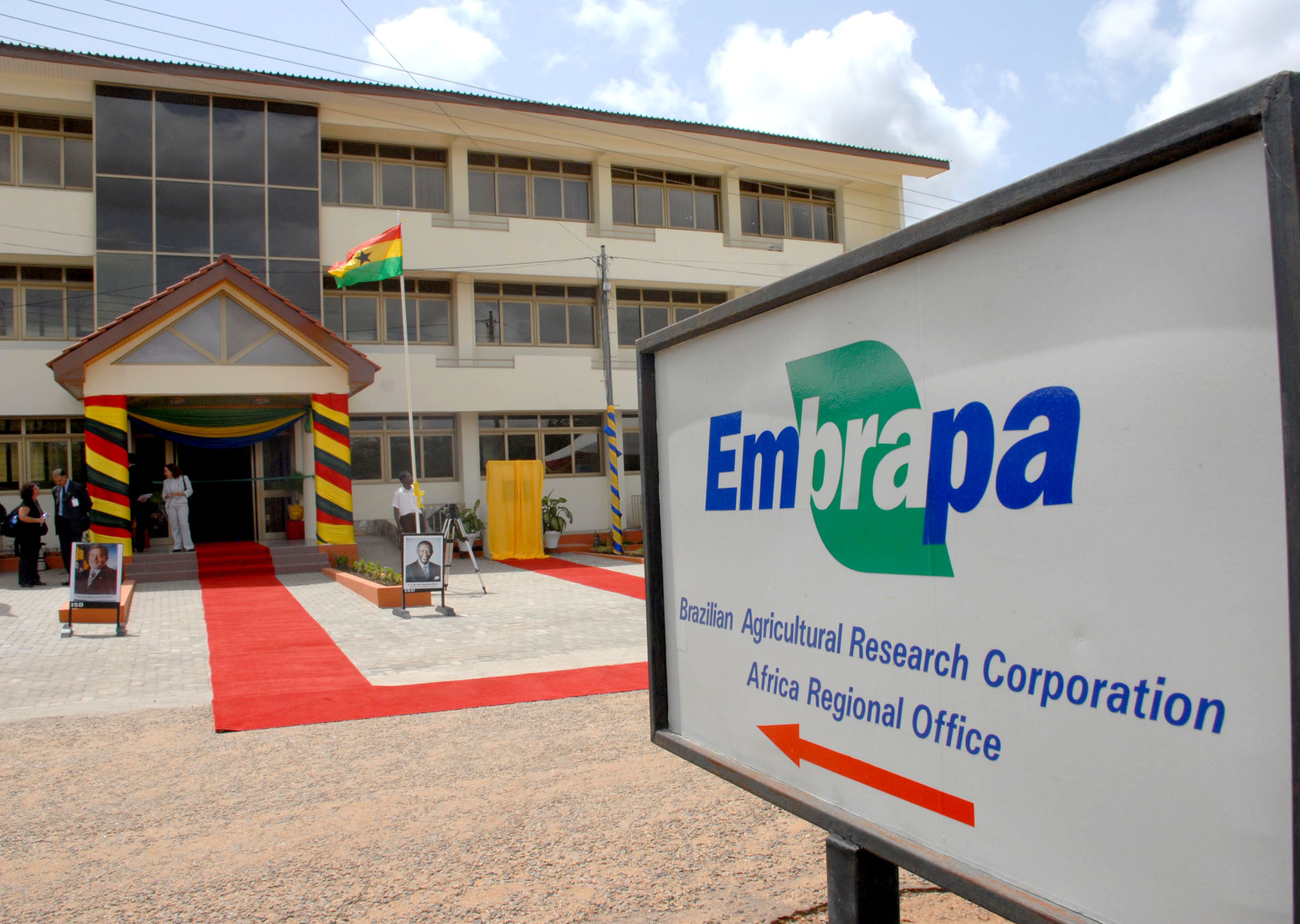 Acra (Gana) - A sede do Escritório Regional da Empresa Brasileira de Pesquisa Agropecuária (Embrapa) na África